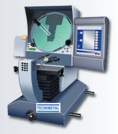 Proyector de perfiles TESA